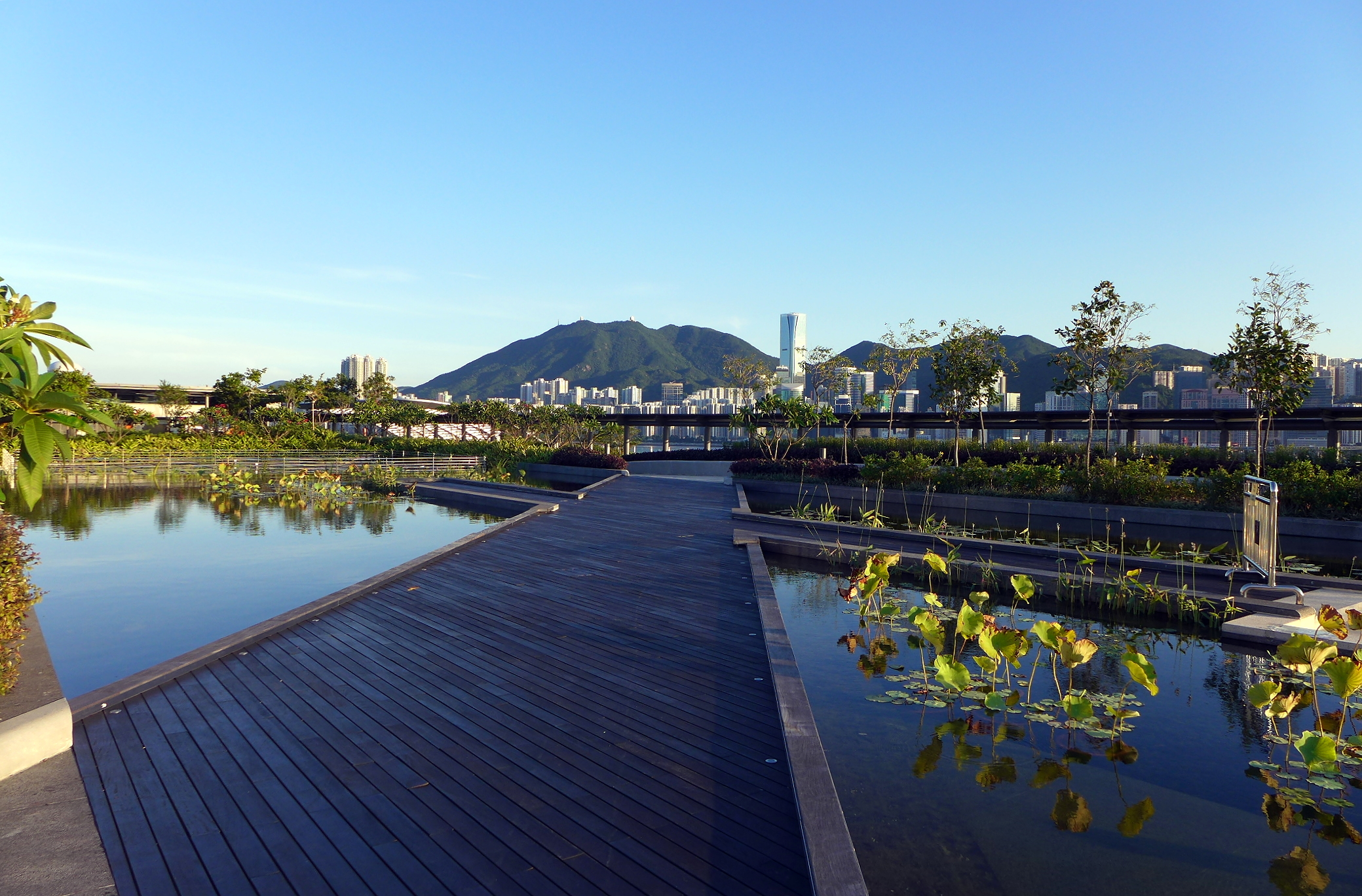 Kai Tak Cruise Terminal Park Water Garden